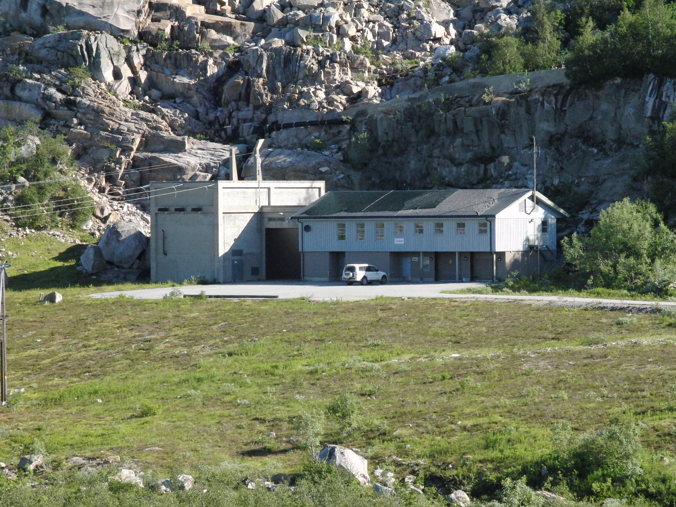 Fagervollan kraftverk